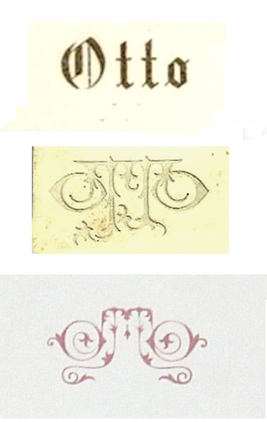 3 logos utilisés par le photographe Otto Wegener (entre 1880 et 1910)